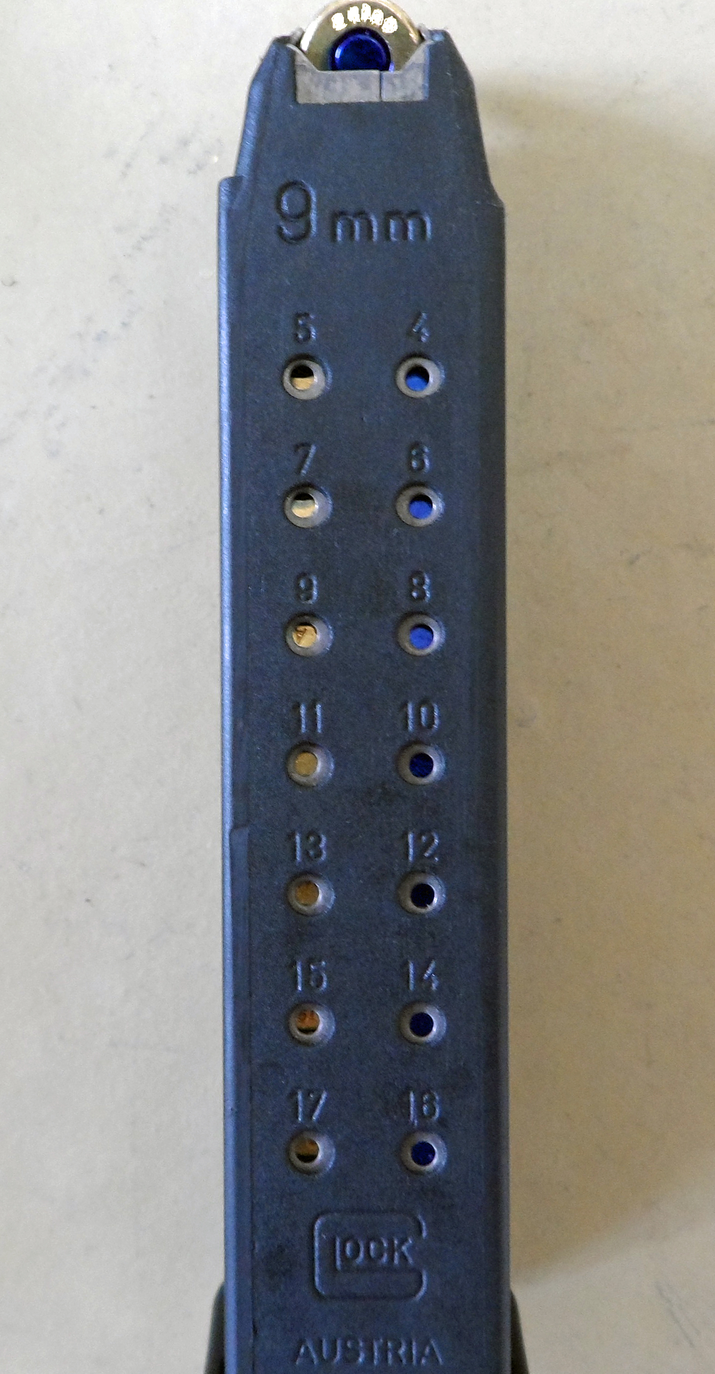 Pistolenmagazin der Glock 17 (P 80) mit Patronen